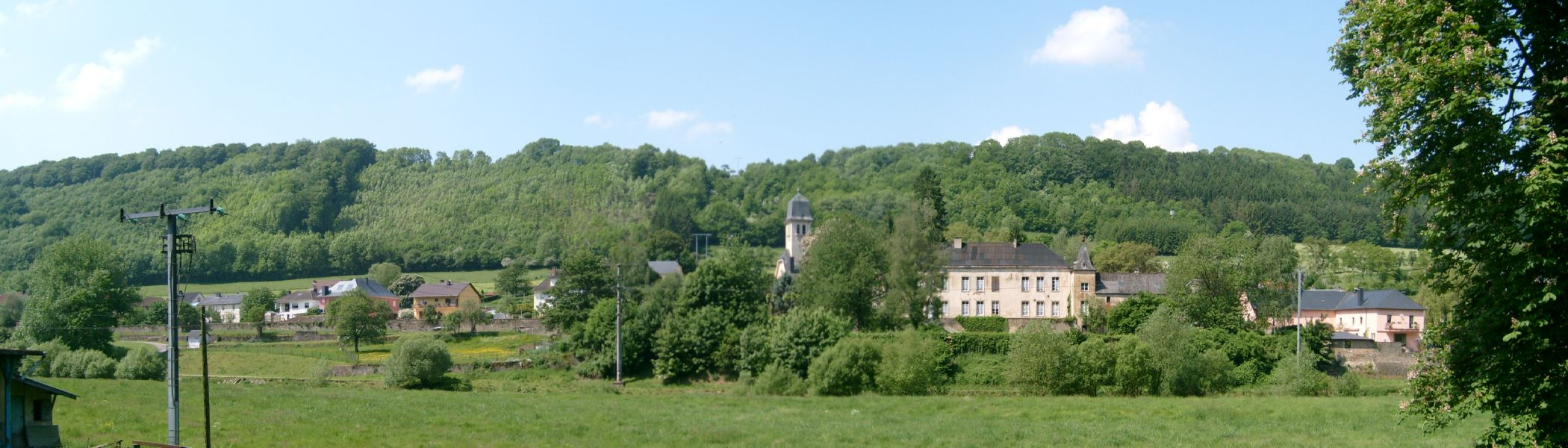 Méischtref.